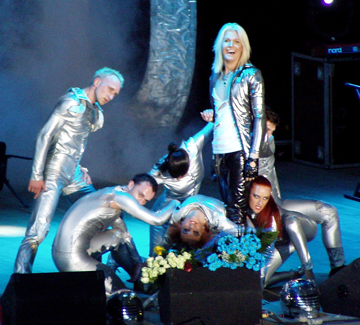 Виступ Бориса Апрєля в Чернівцях.